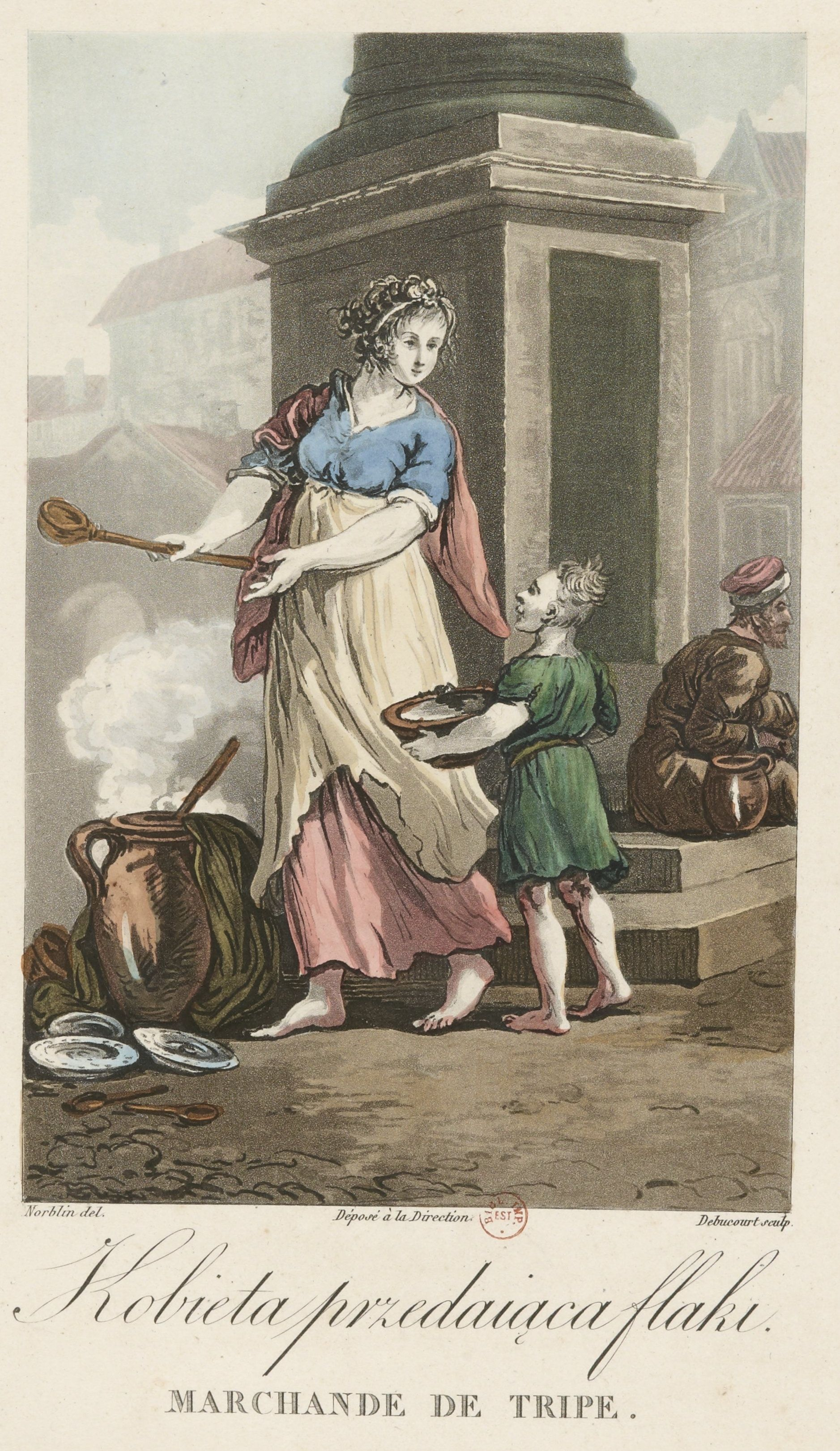 Торговка требухой